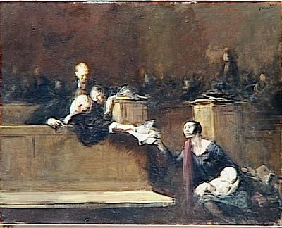 Cena de tribunal Sámegiella: Szene im Gerichtssaal